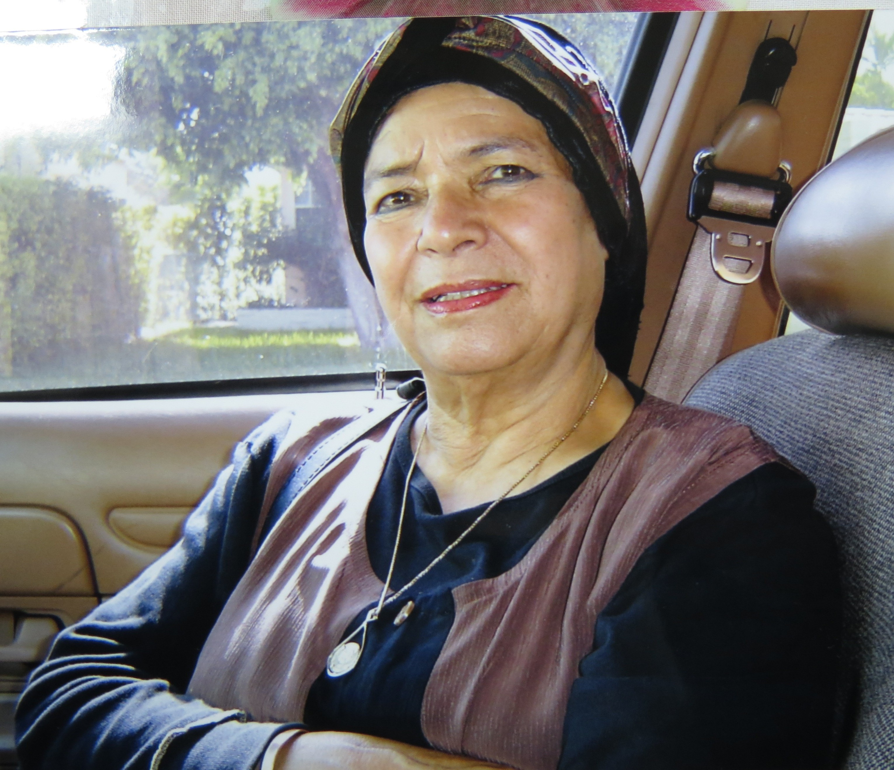 נעמי חובארה